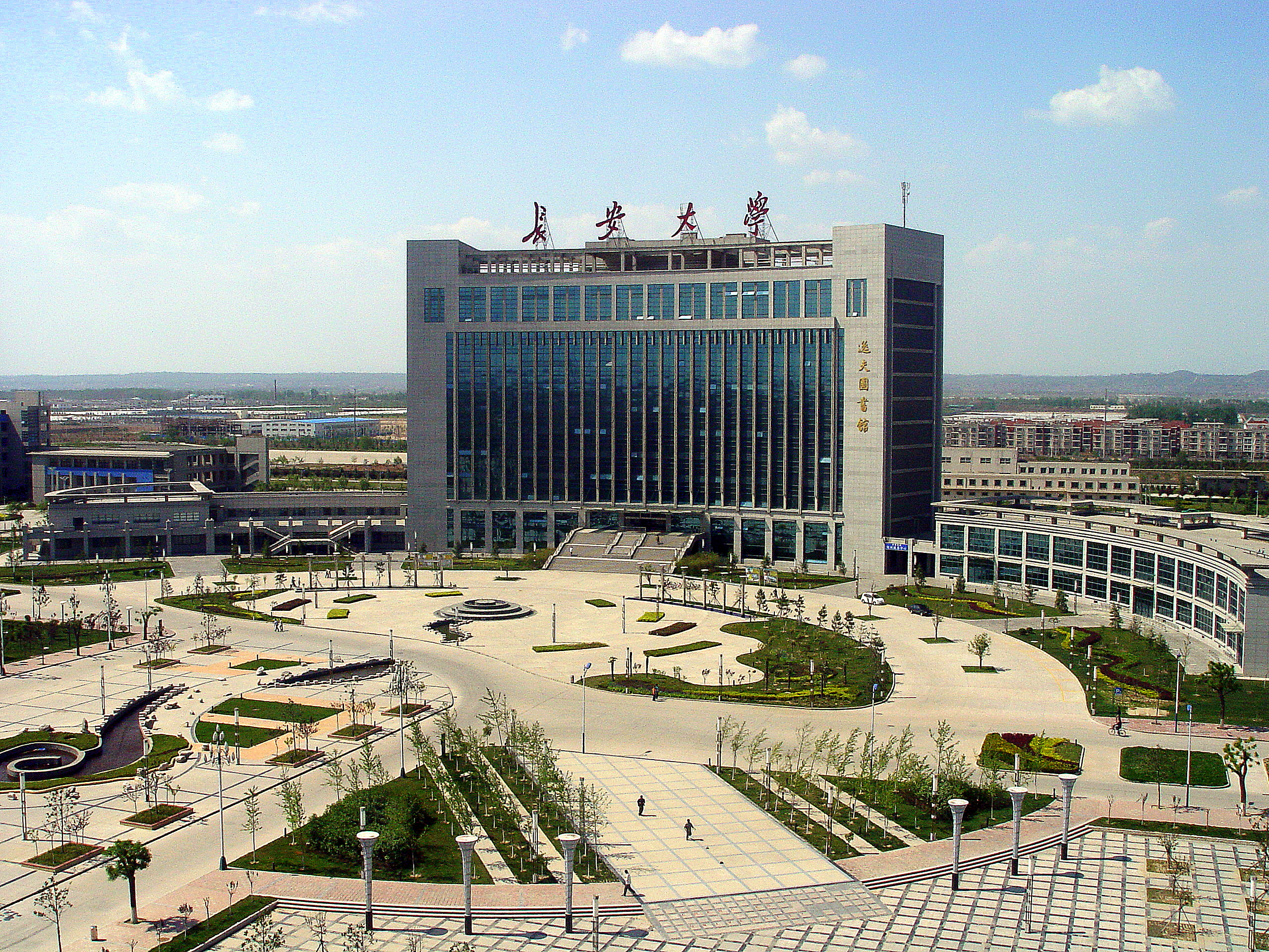 长安大学渭水校区图书馆及前广场全貌